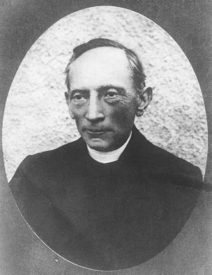 Prezes Towarzystwa Naukowego w Toruniu ks. Stanisław Kujot.